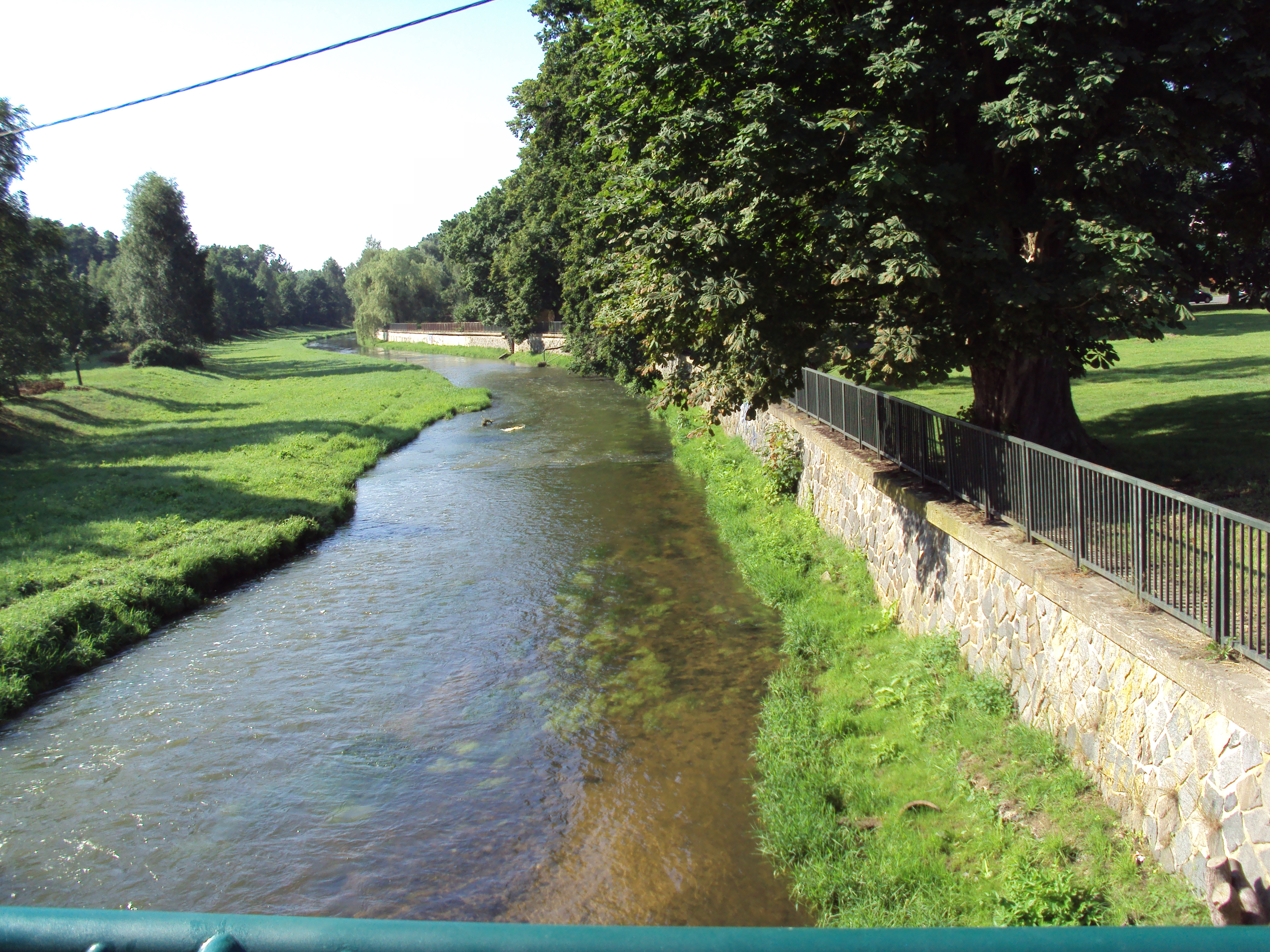 Ploučnice ve středu města, podél zdi parku